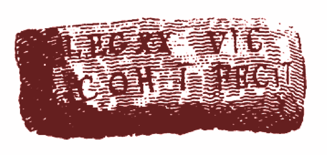 Bauinschrift aus roten Sandstein der Legio XX, cohors I, gefunden 1792 in der Castle Street, Stanwix (GB).